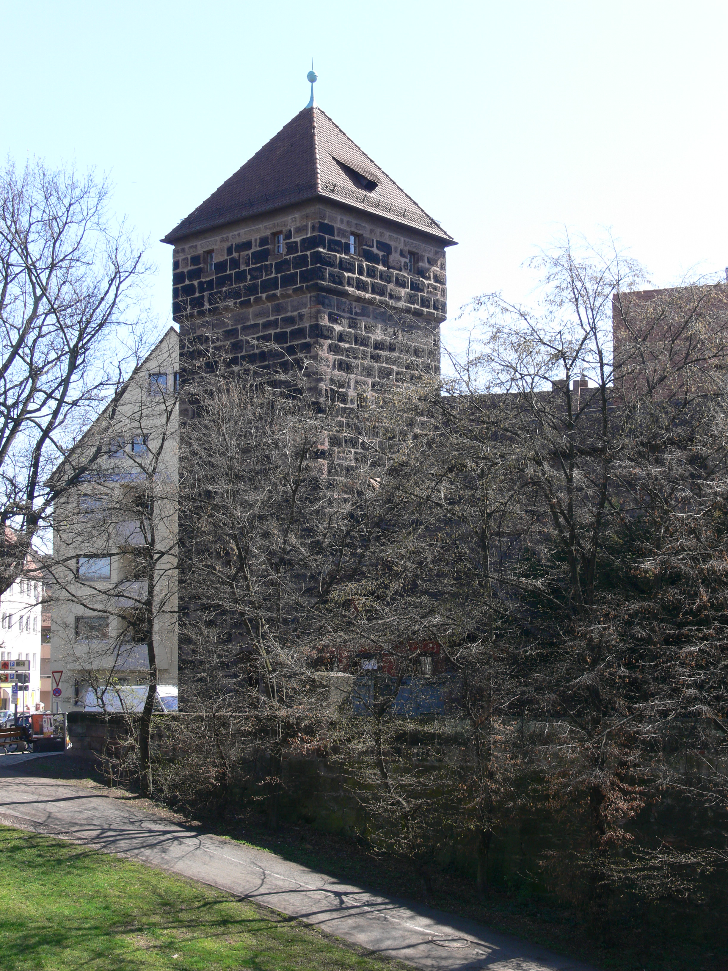 Nürnberg, Spittlertormauer, Turm Grünes B – Museum „Turm der Sinne“ (Spittlertormauer 17), Feldseite